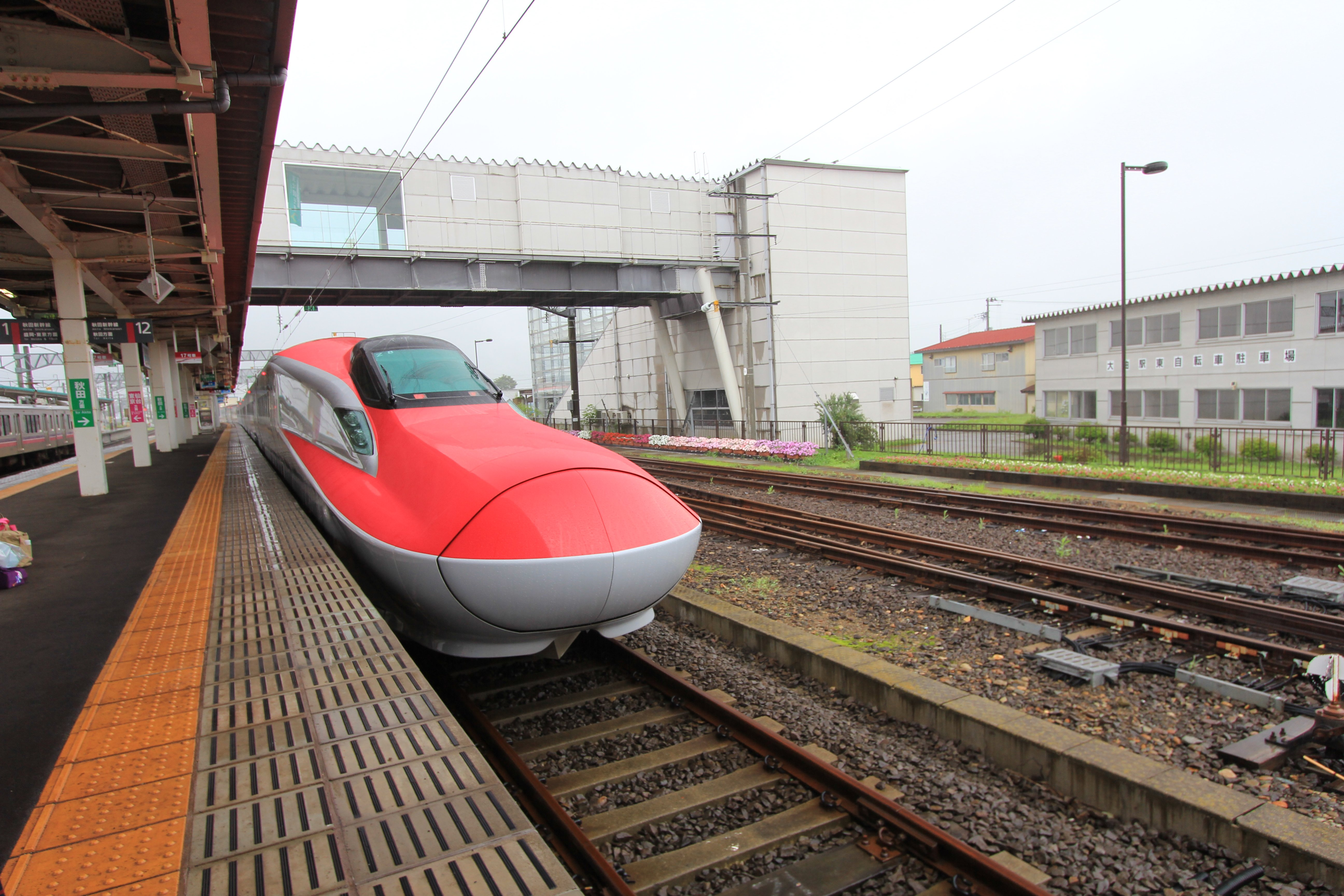 大曲駅